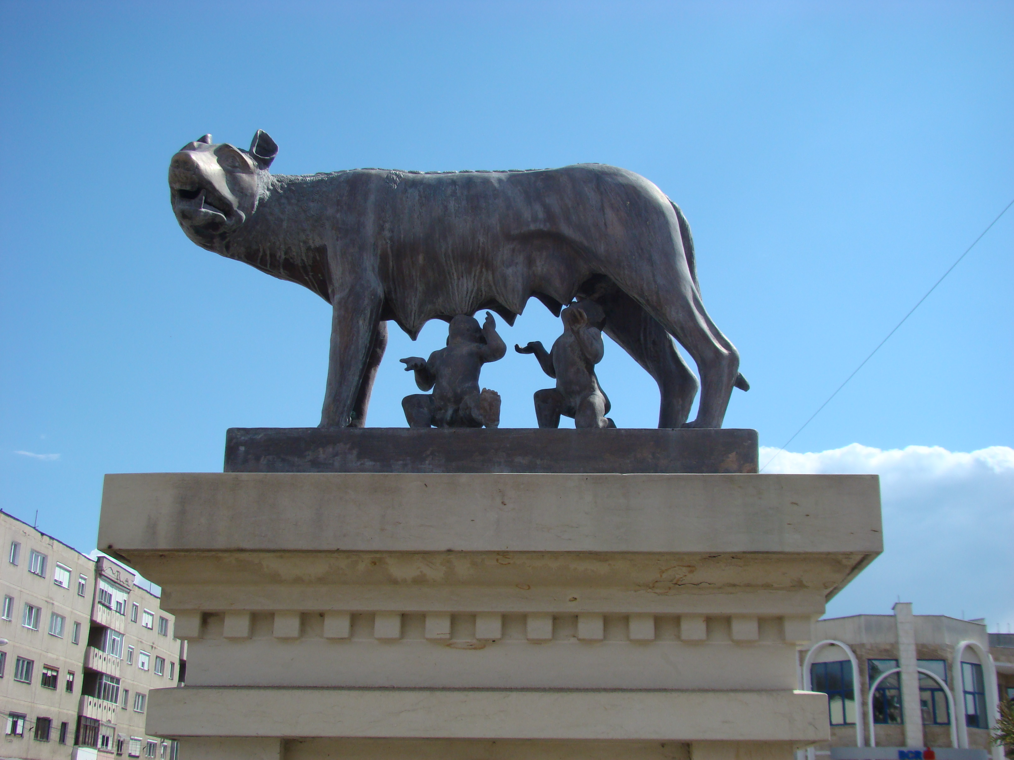 Statuia Lupoaicei din Brad